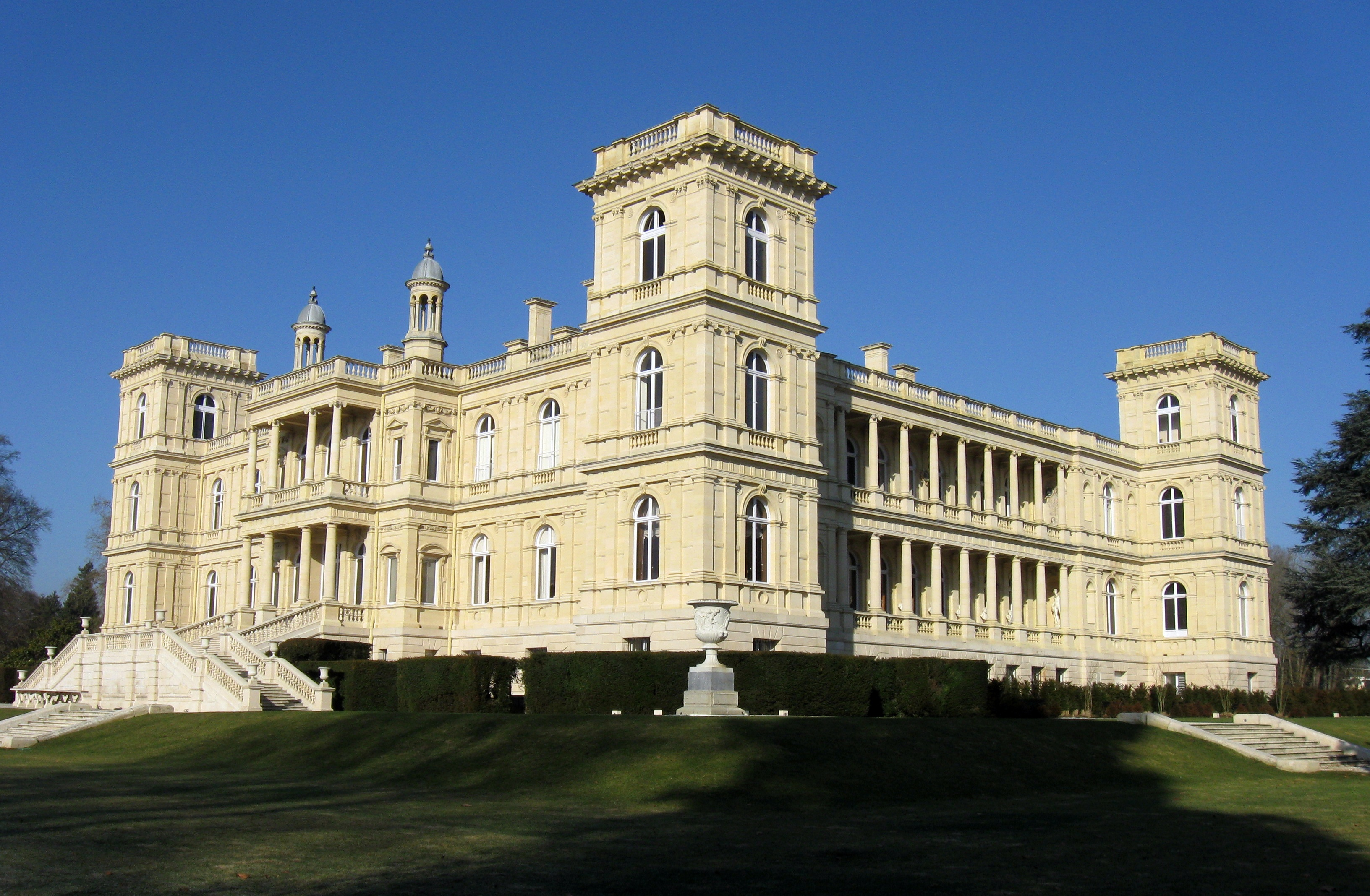 Le château de Ferrières-en-Brie (Seine-et-Marne, région Île-de-France).